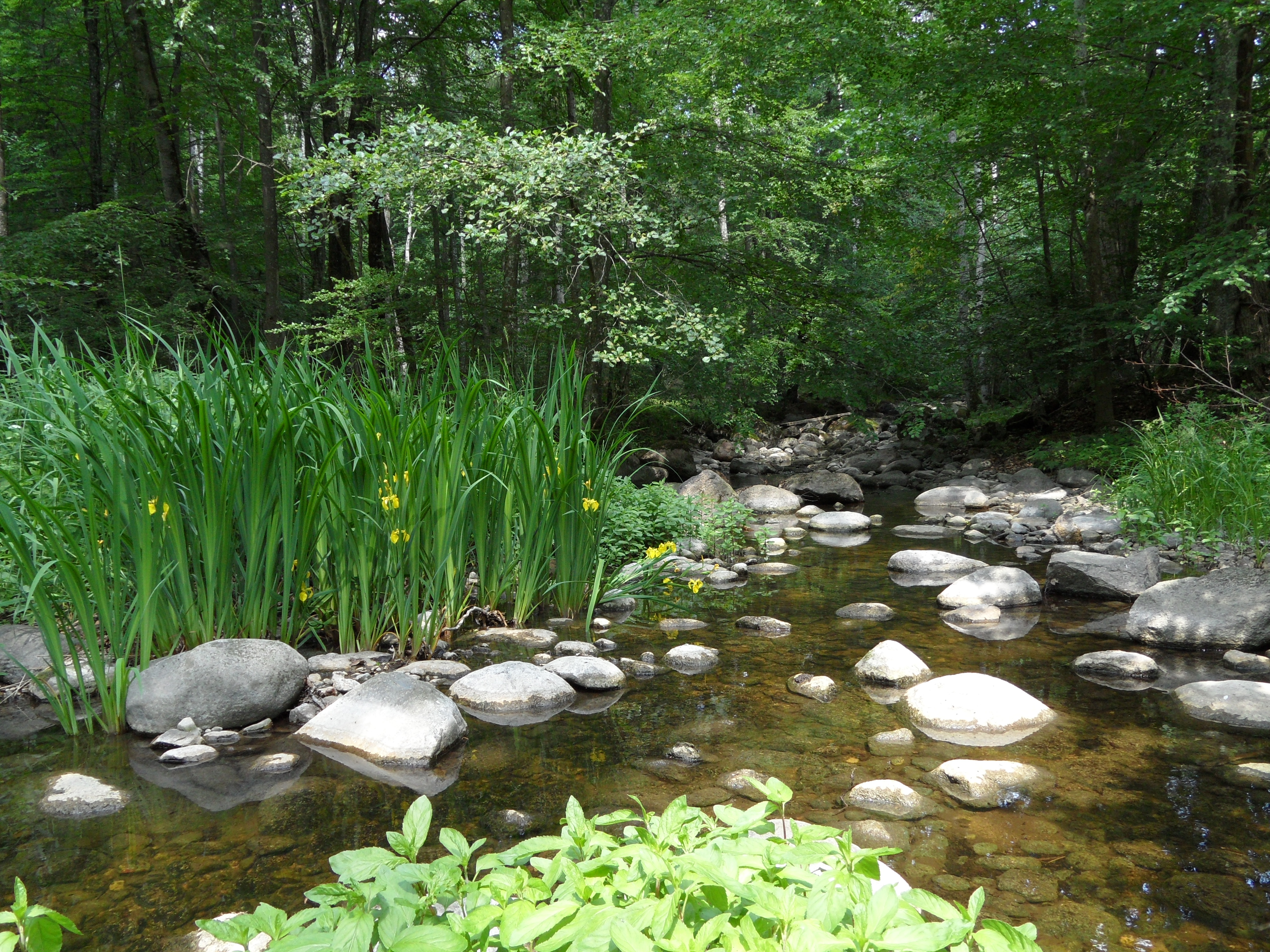 Borstbäcken sommar